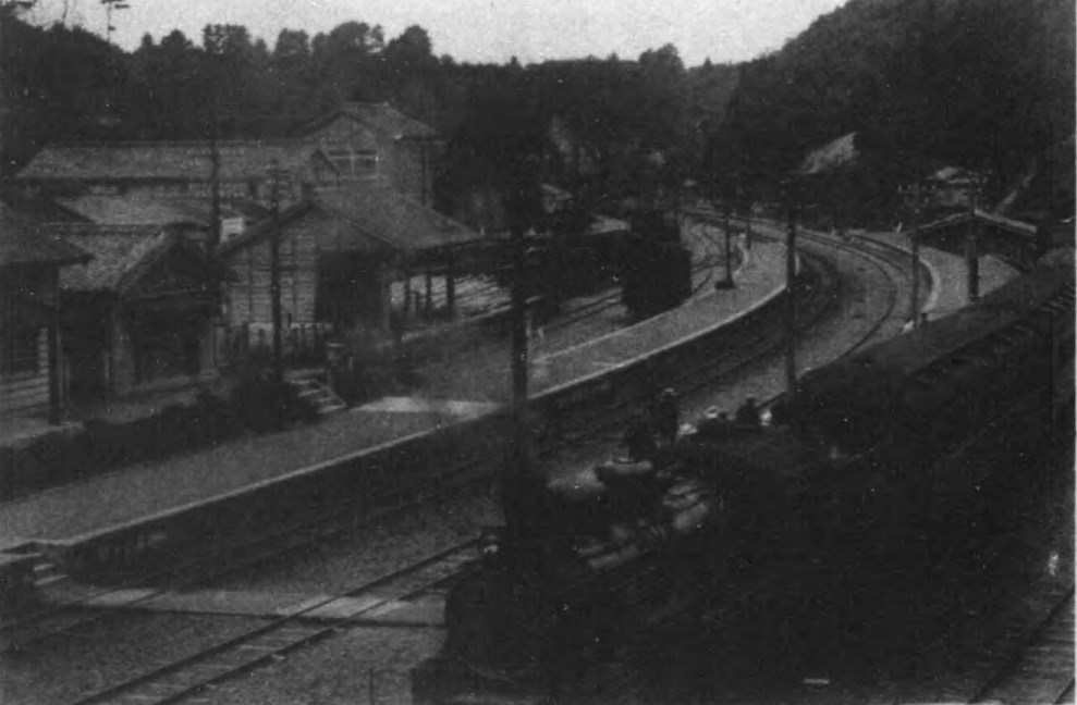 鹿児島本線饅頭石駅（現在の上伊集院駅）を1937年以前に撮影した写真。